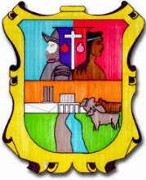 Escudo de Armas de Mier Tamaulipas